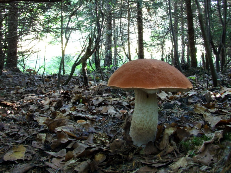 Leccinum aurantiacum. Karmėlava forest, Lithuania.